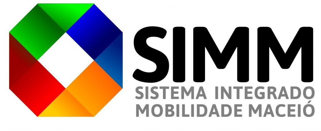 Sistema Integrado de Mobilidade Urbana de Maceió